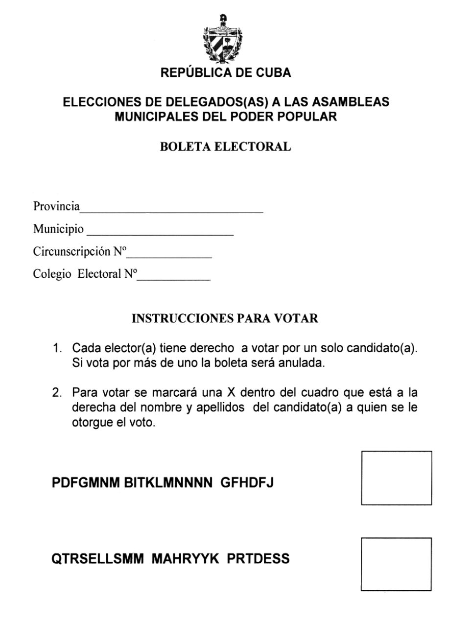 Reproducción de la cédula de votación usada en las elecciones municipales de Cuba de 2015